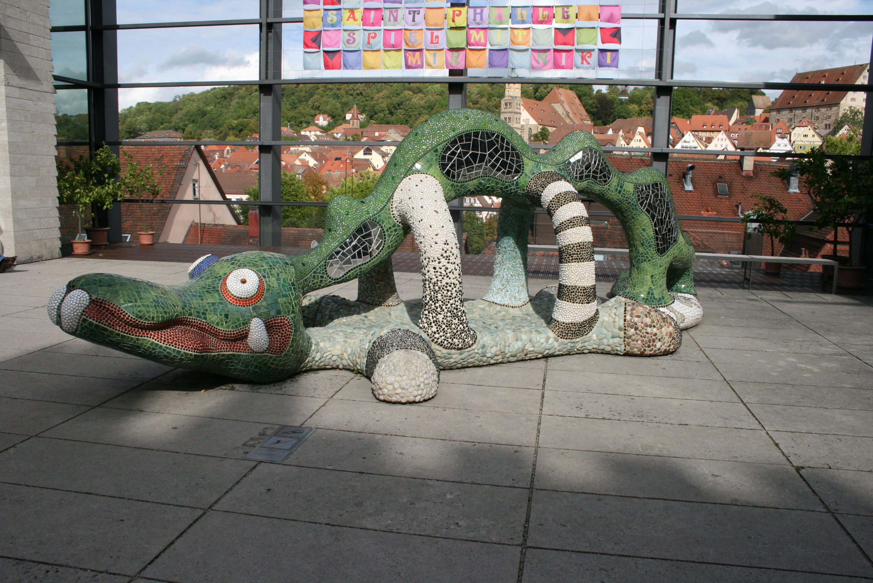 Skulptur von Niki Saint Phalle vor der Kunsthalle Würth in Schwäbisch-Hall